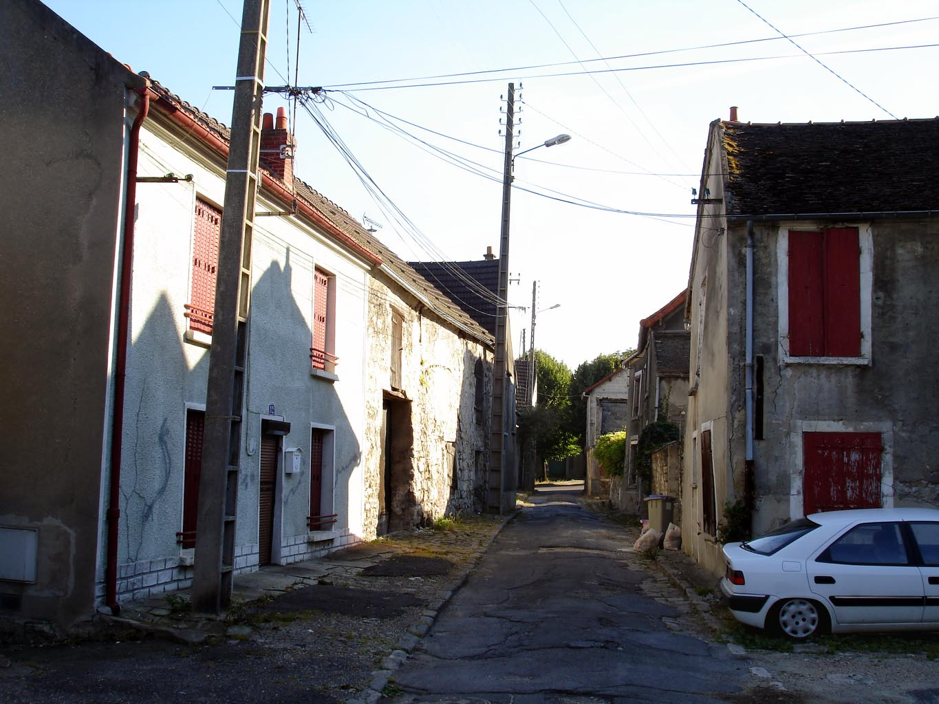 L'impasse du Bassin à Goussainville (Val-d'Oise, France)